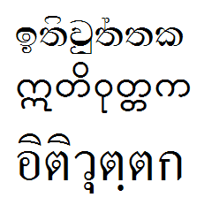 итивуттакапали